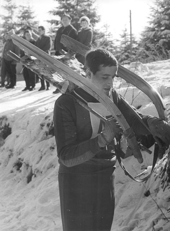 Michael Köhler Zentralbild Gahlbeck 23.2.1964 Friedrichroda erlebte Deutsche Meisterschaften im Rennschlittensport-Deutsche Rennschlittenmeister im Einsitzer wurden am 23.2.1964 in Friedrichroda (Thüringen) nach dramatischen Kampf die Olympia-Goldmedaillengewinnerin Ortrun Enderlein und der 19jährige Michael Köhler, der Bruder des Goldmedaillengewinners von Innsbruck, Thomas Köhler (beide SC Traktor Oberwiesenthal) UBz: Michael Köhler trägt seinen Schlitten zum Start des nächsten Laufes. Noch ahnt er nicht, daß der den Meistertitel erringen wird.